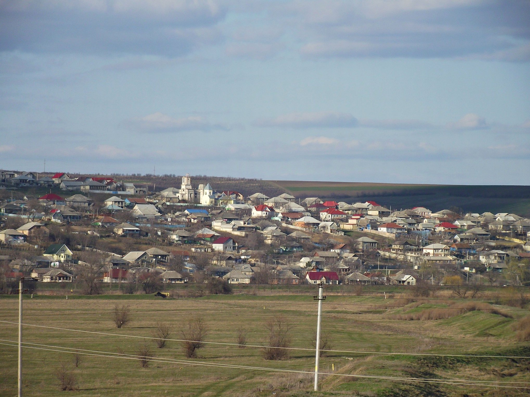 R2, Sîngera, Moldova